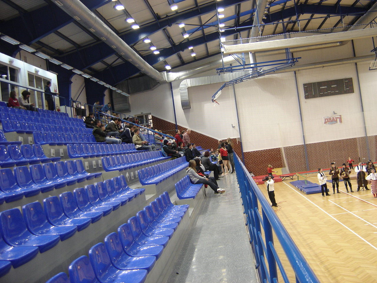 Nastavno-sportska dvorana u Belom Manastiru